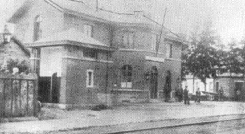 Première gare de Silenrieux agrandie, photographiée entre 1896 et 1904